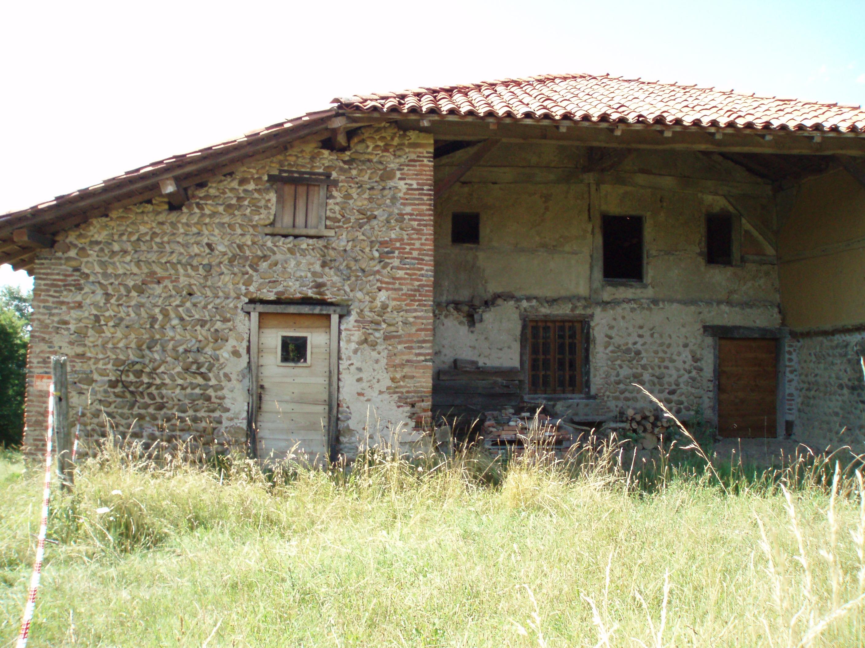 La ferme